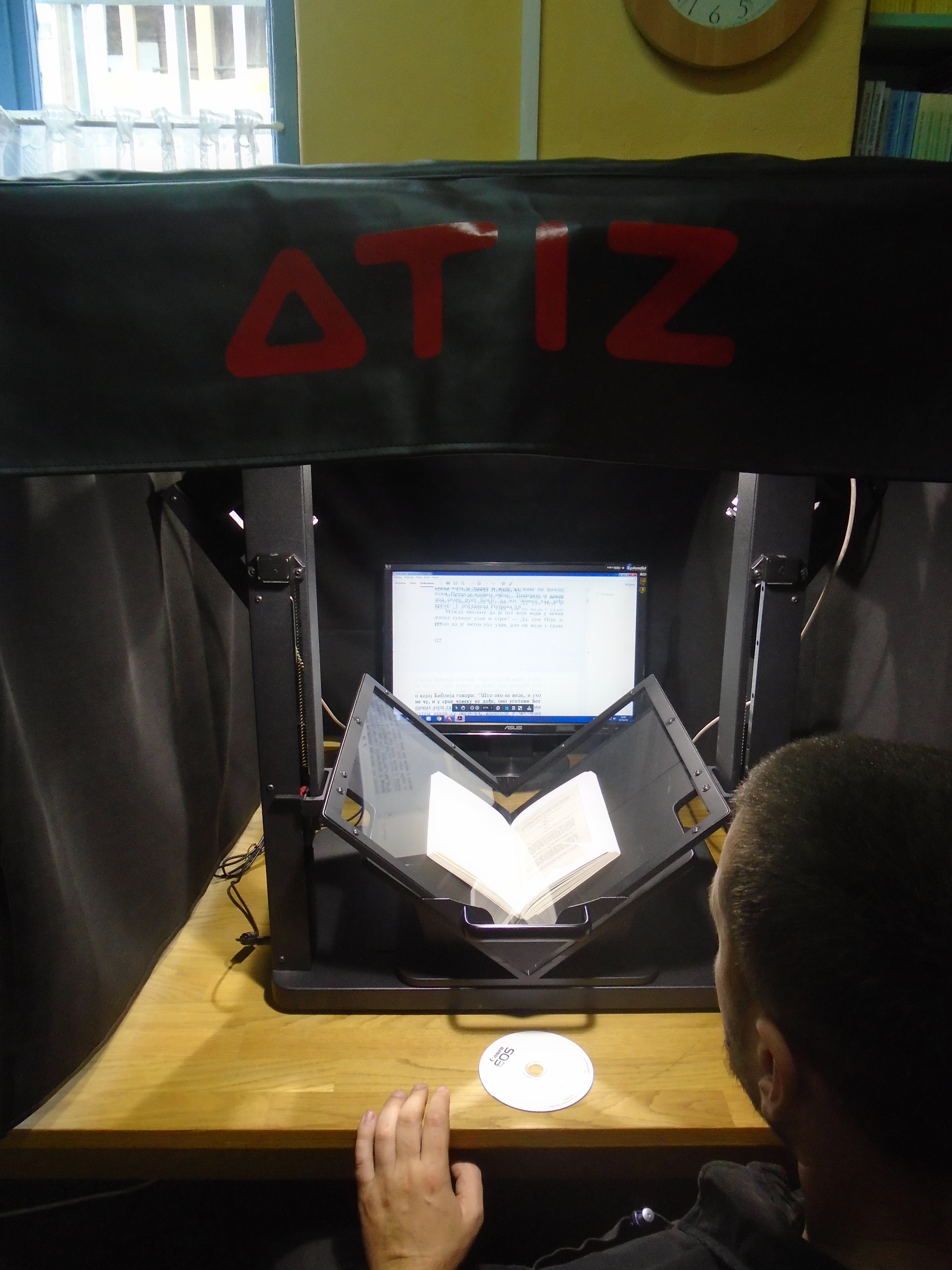 ЈУ НБГ Одјељење за дигитализацију